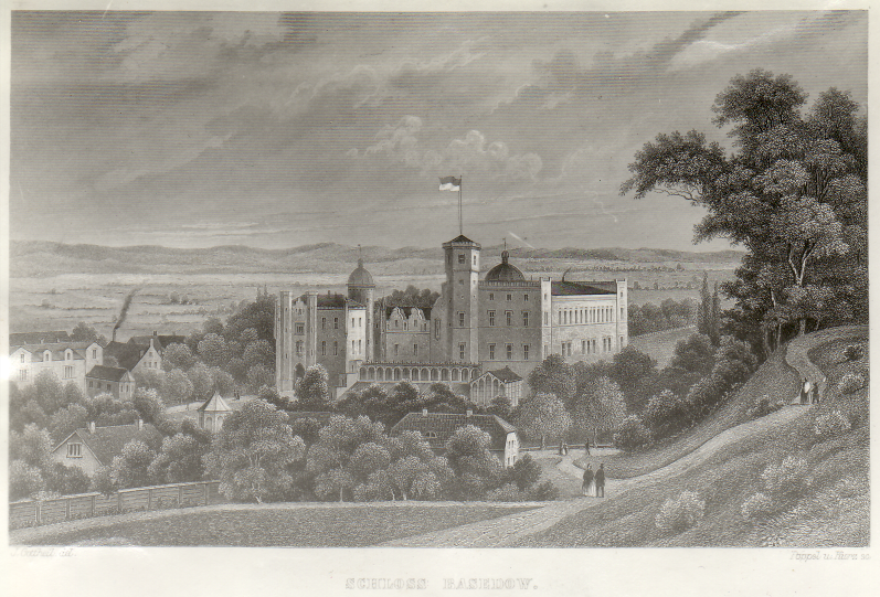 Schloss Basedow nach dem Umbau durch Friedrich August Stüler